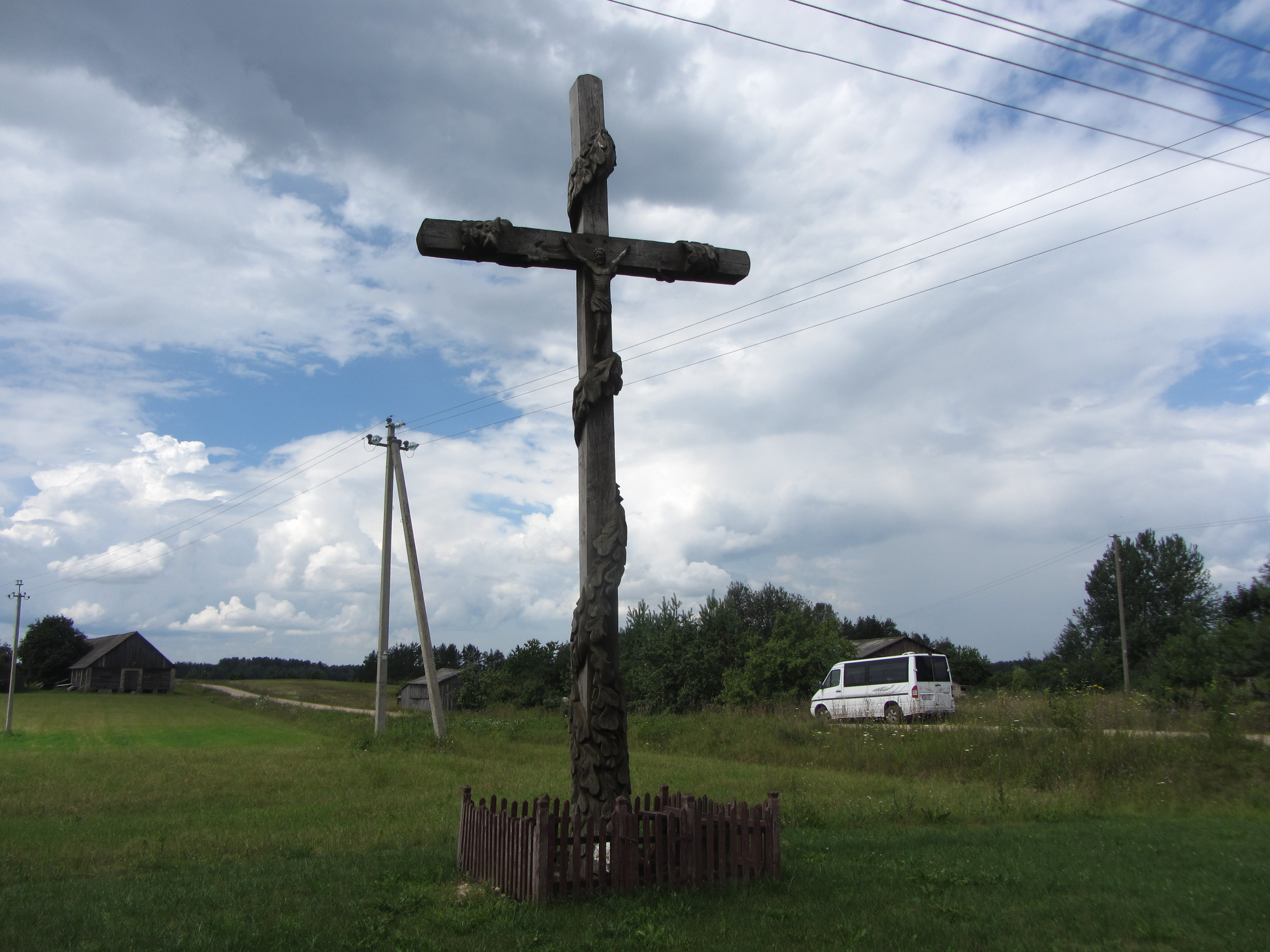 Purvynė, Lithuania